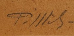 Semnatura Panait Mihailescu